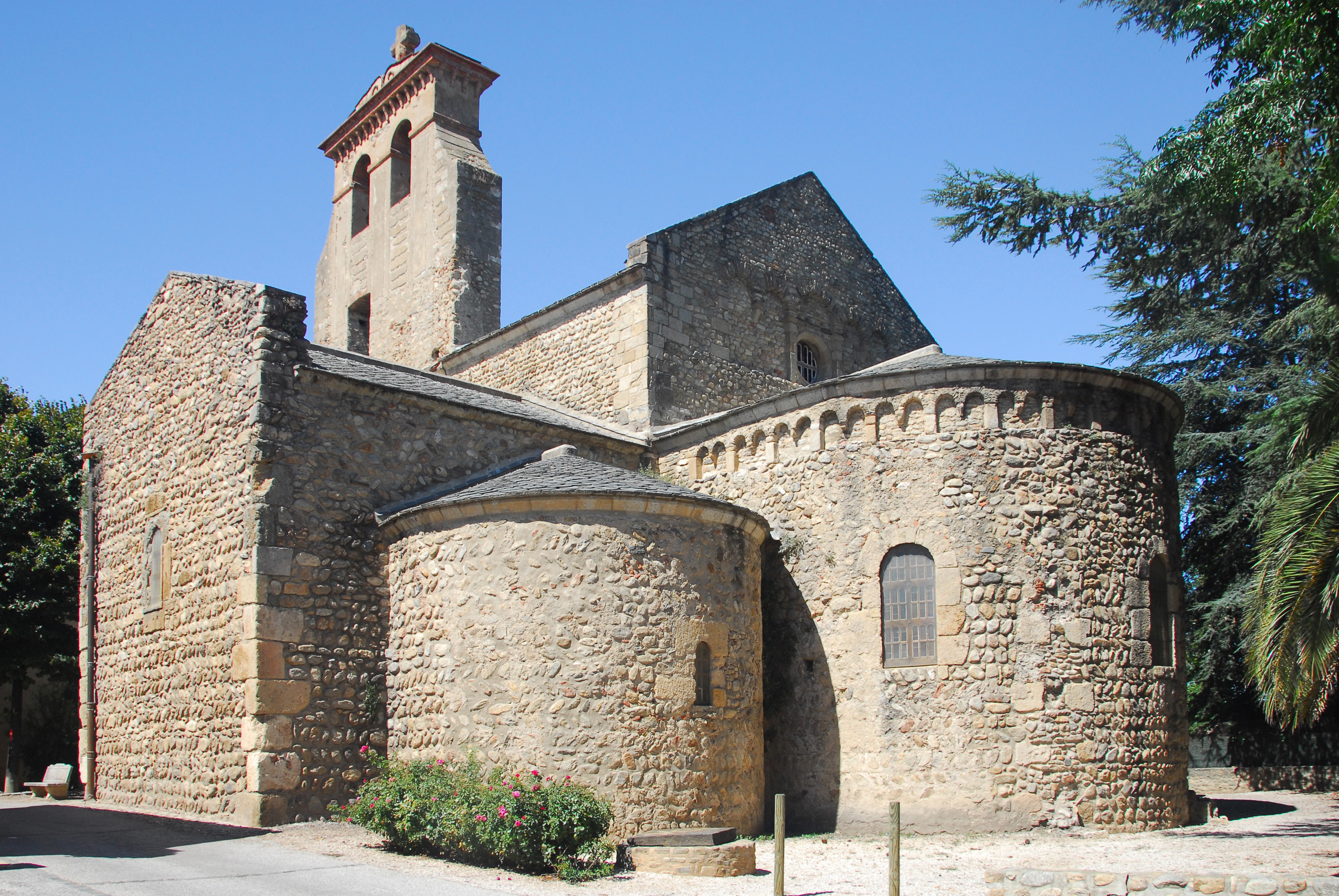 St-André-de-Sorède, Chorhaupt von SO